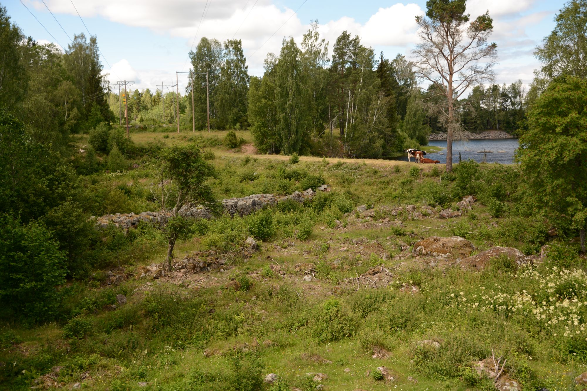 En del av lämningarna efter bygget av Gråda kanal på 1800-talet (Gråda, Gagnef, Dalarna, Sverige)